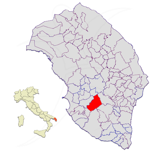 Il territorio del comune di Casarano nella provincia di Lecce